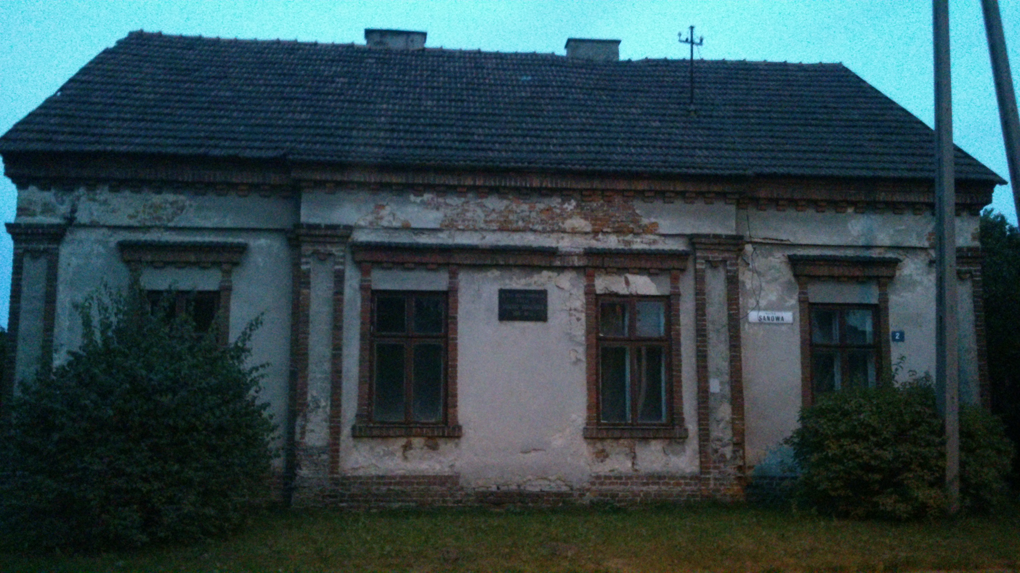 Dom Tadeusza Hollendra w Leżajsku